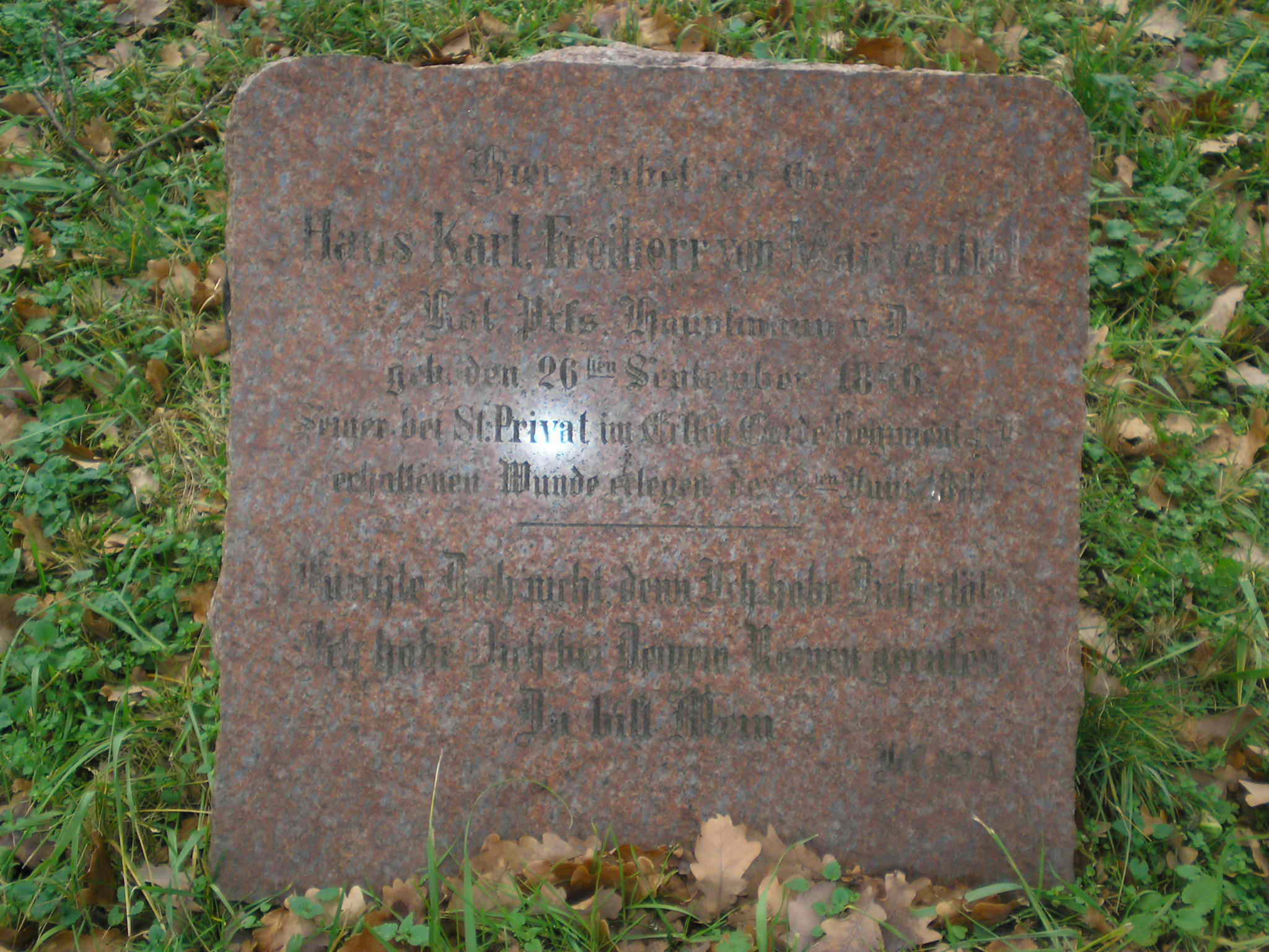 Grobowce rodziny Manteuffel w Toporowie